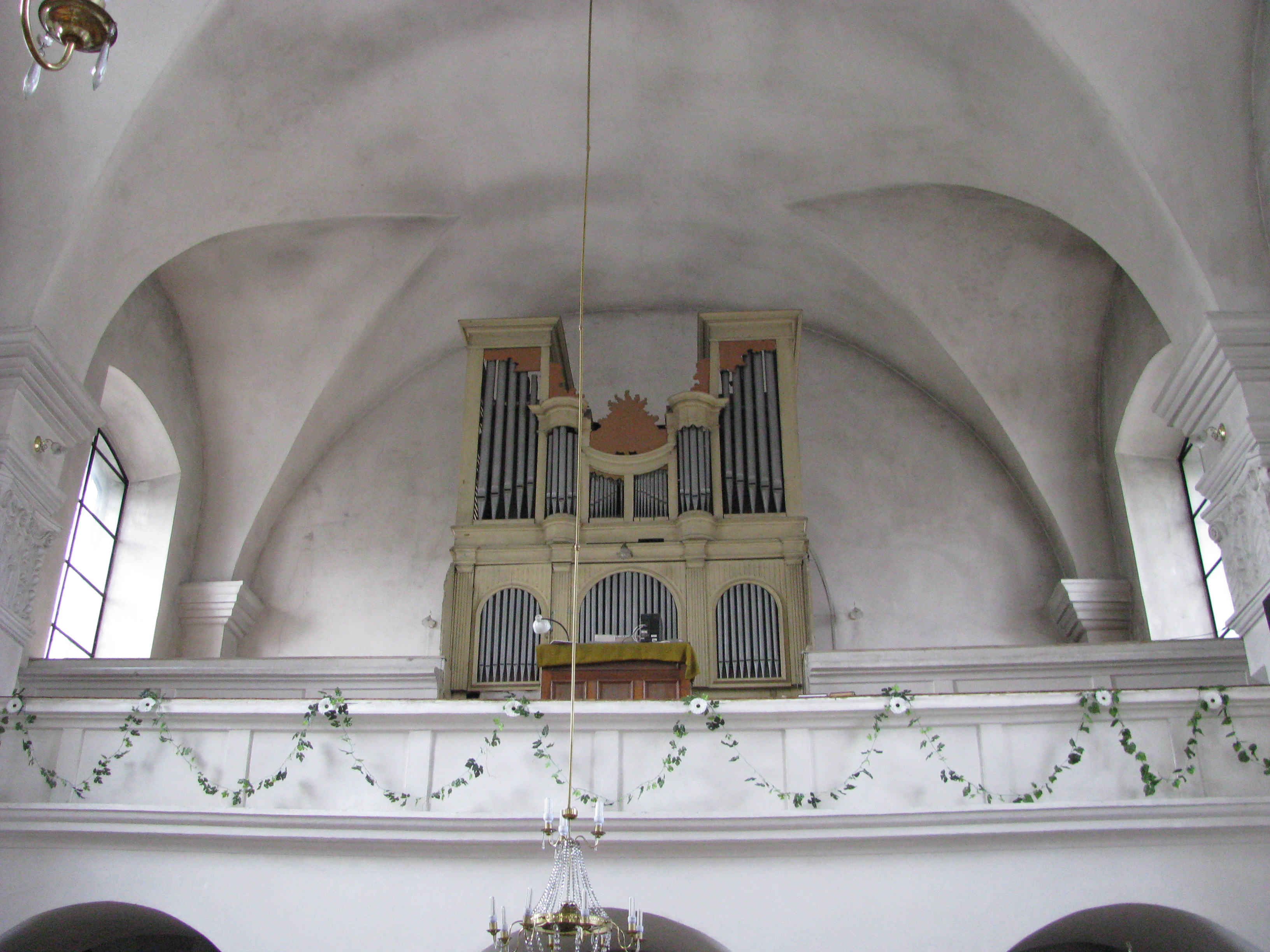 Беларуская (тарашкевіца): Комплекс былога кляштару бэрнардынак:касьцёл Марыі.Дэкаратыўнае аздабленьне: пяць алтароў, амбон, арнамэнтальная разьба,арганжылы корпус. г. Слонім This is a photo of Belarusian heritage monument. Reference number: 412Г000505 ( WLM)